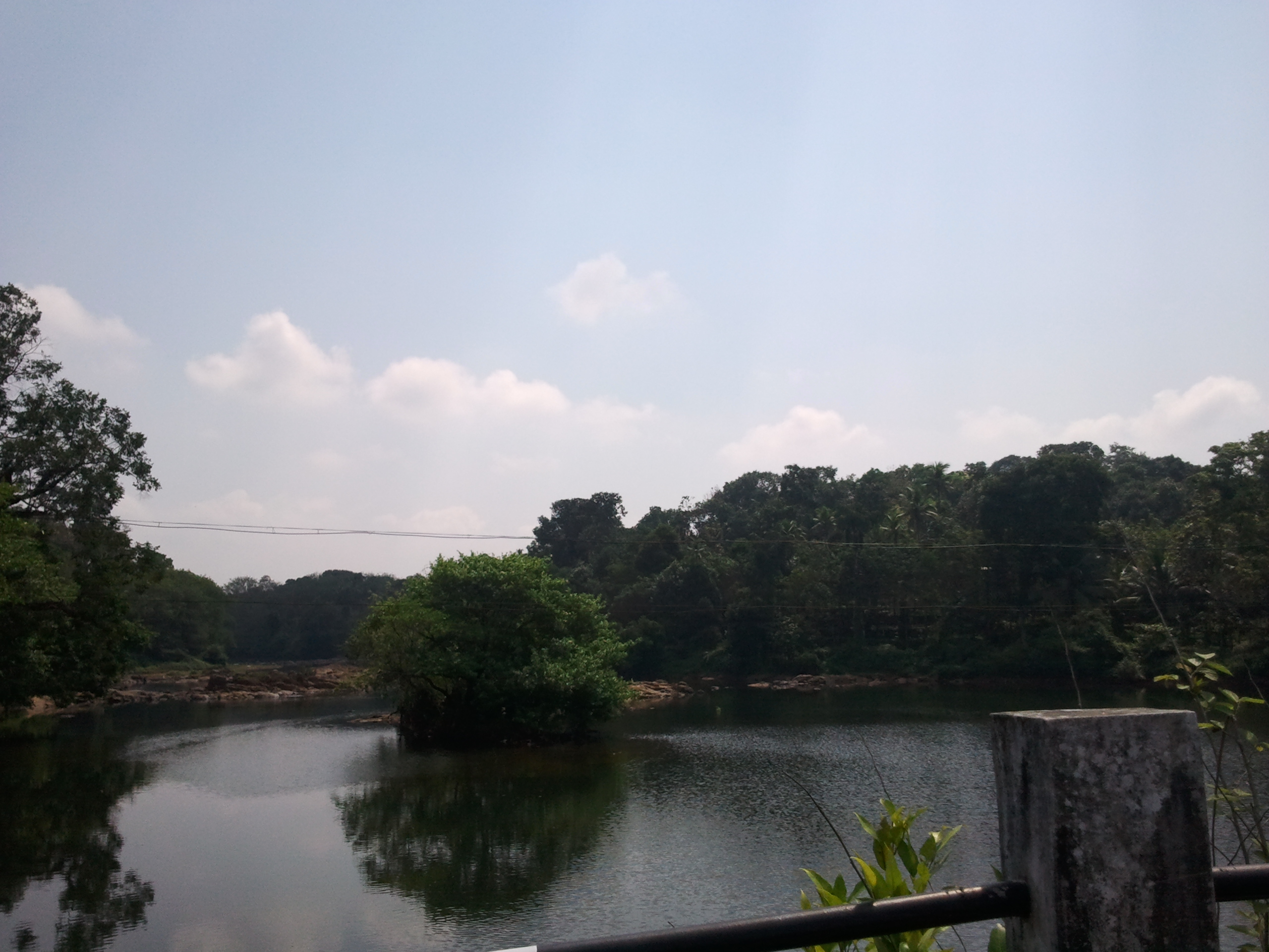 മണിമലയാർ മണിമലയിൽ